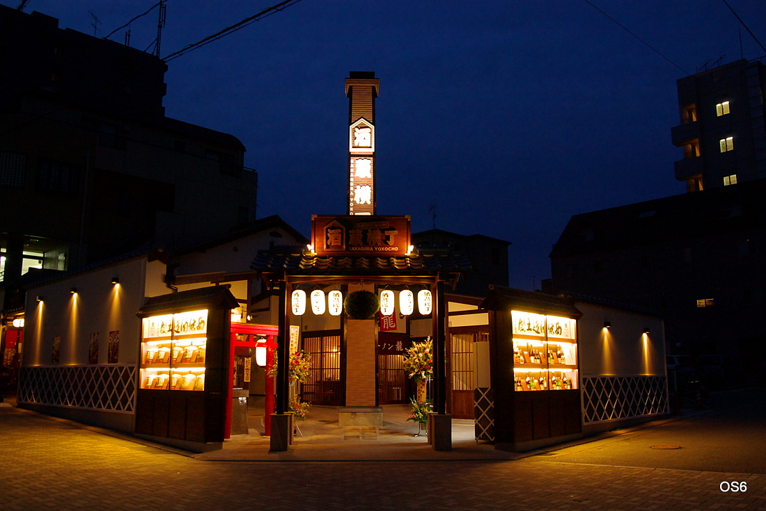 酒蔵横丁 Sakagura Yokocho